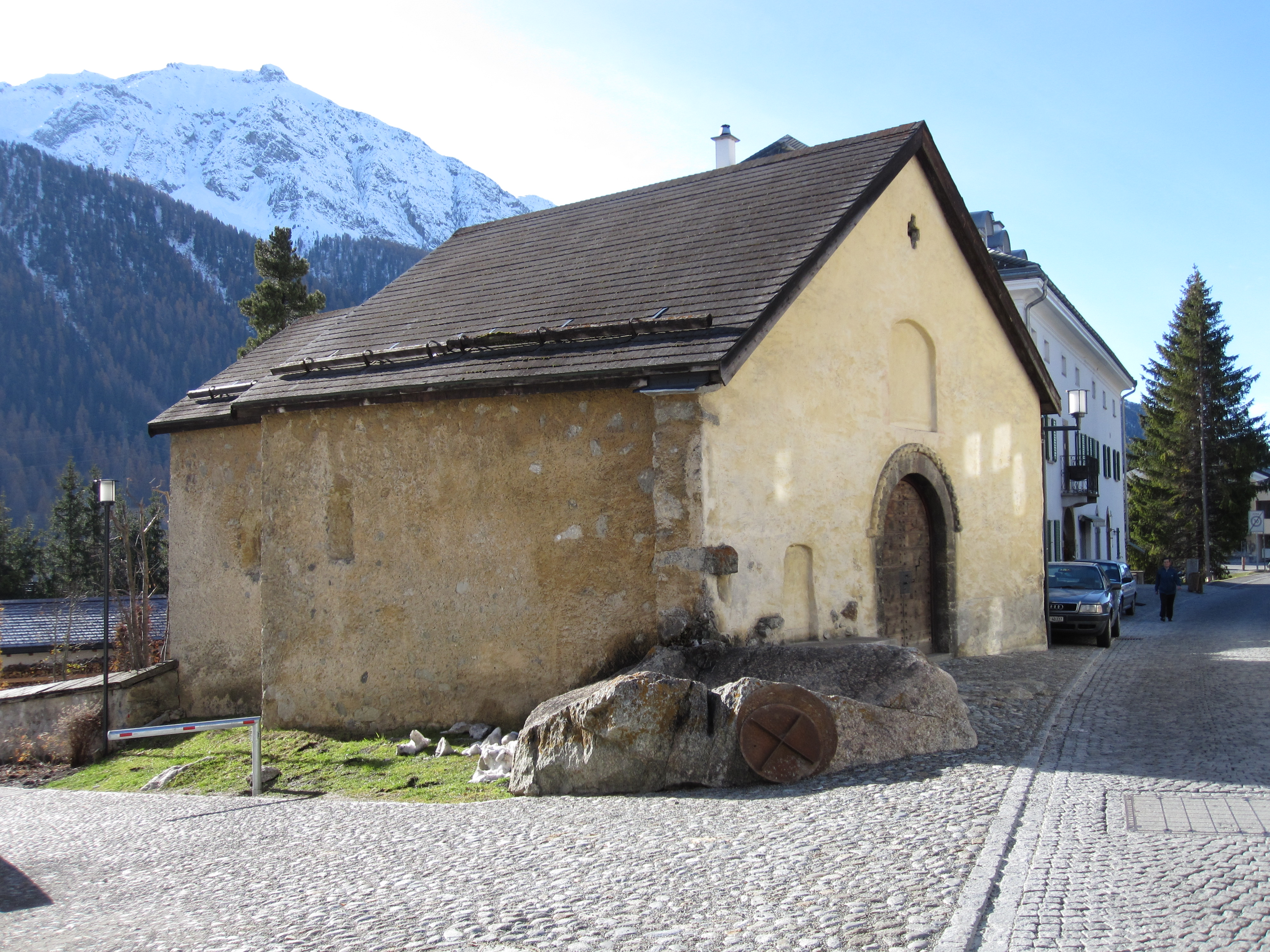 Kirche San Bastiaun in Zuoz (Oberengadin, Kanton Graubünden)